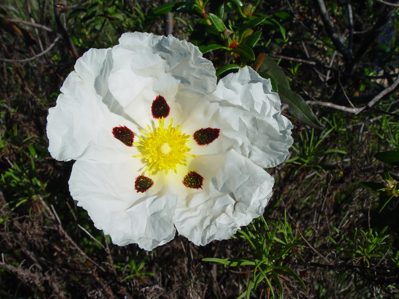 Name Cistus ladanifer Familiy Cistaceae